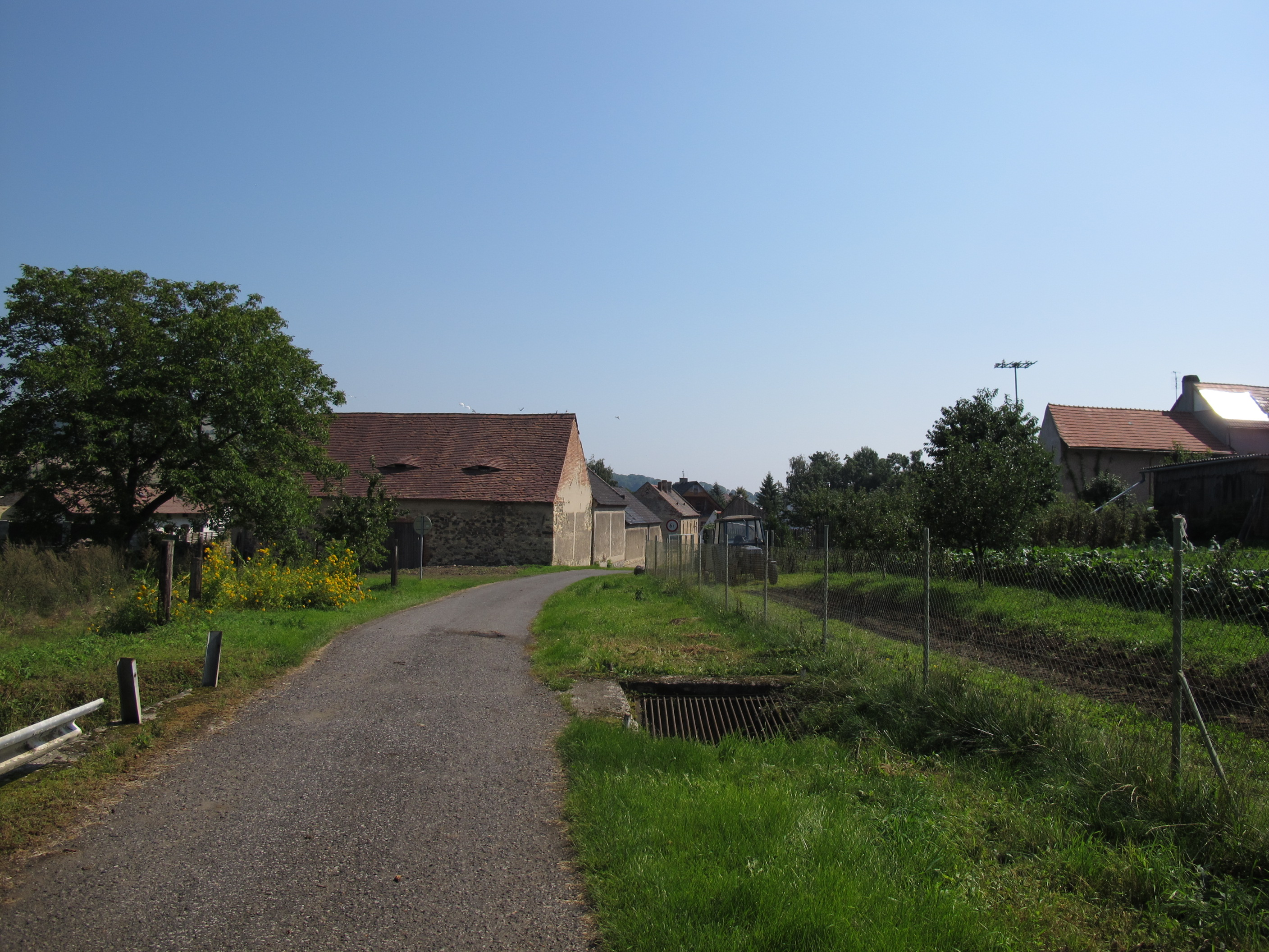 Osada Odolice